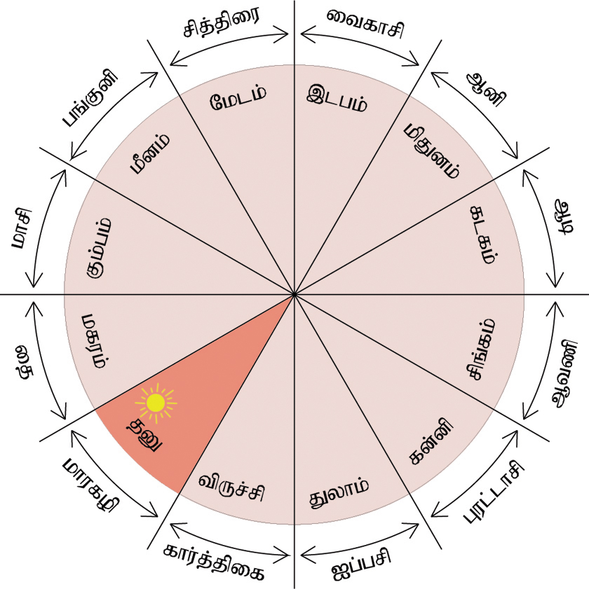 Drawn by the user who uploaded it here.